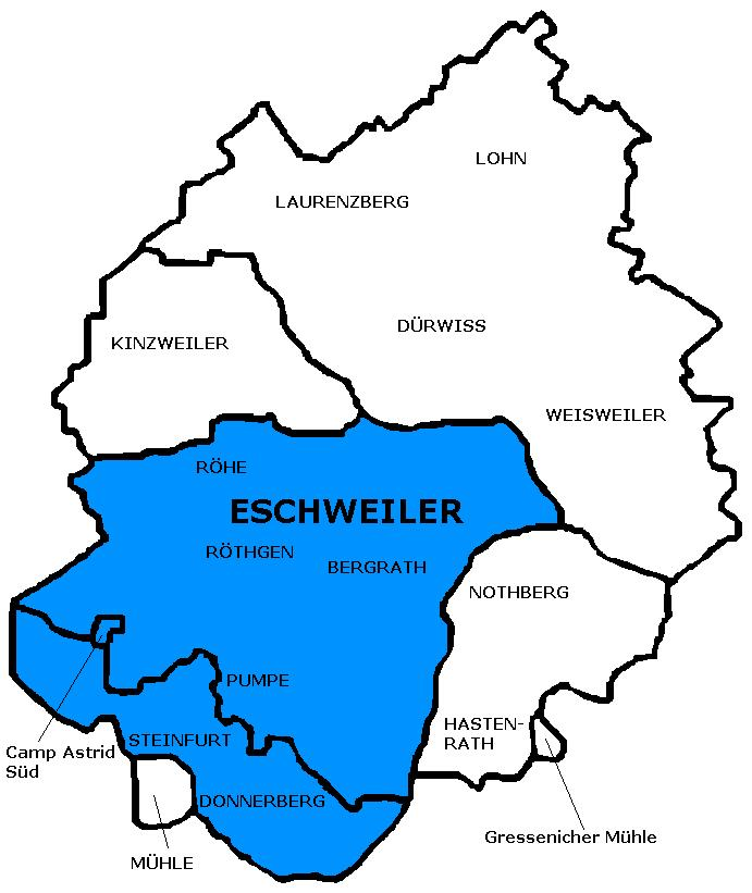 Ewentwicklung1900